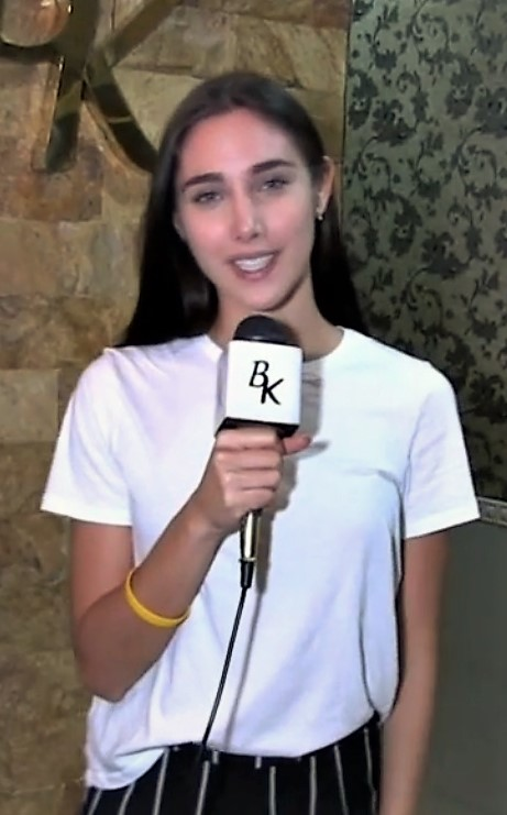 ¡Edymar Martinez, Miss International 2015, realiza su labor social junto a Belankazar! Academia y Agencia de Modelos Belankazar ★★ OFFICIAL WEBSITE ★★ ★ Blog Bk: ★ Videos Bk: ★Facebook: ★Instagram: ★Twitter